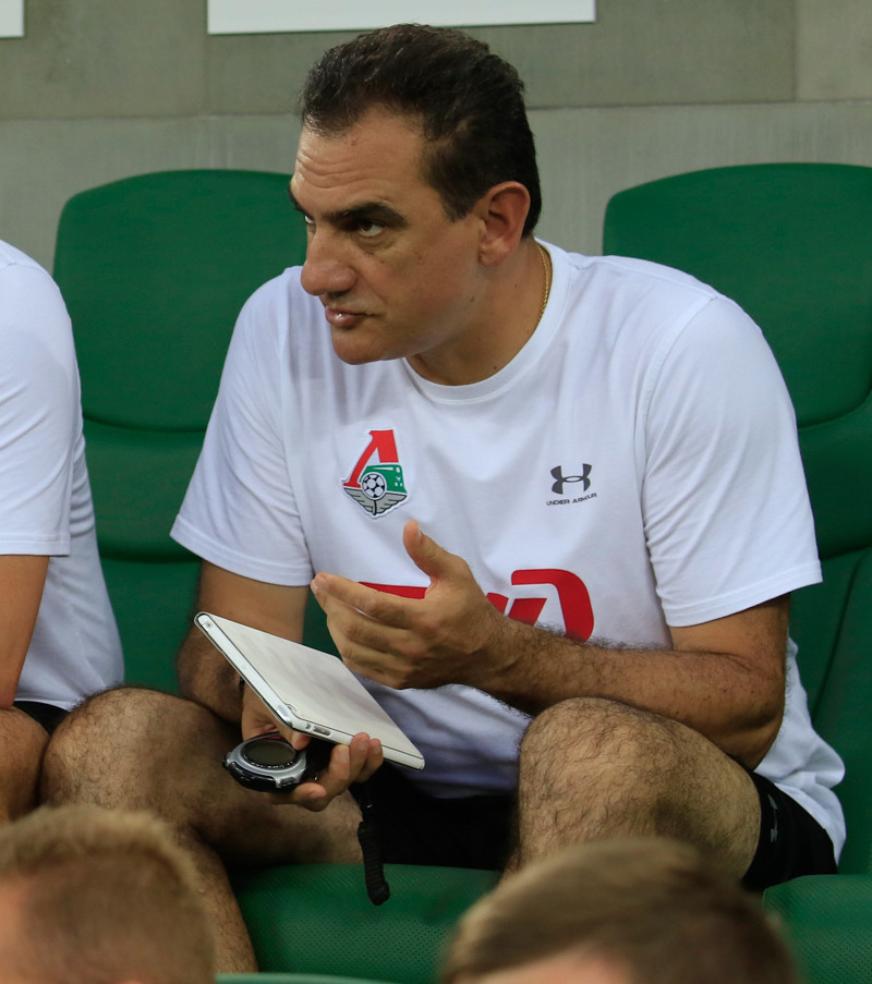 «Железнодорожник» Смолов снова в Краснодаре. Как это было